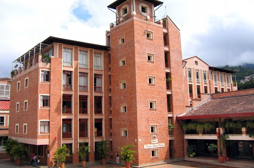 Campus El bosque UNAB